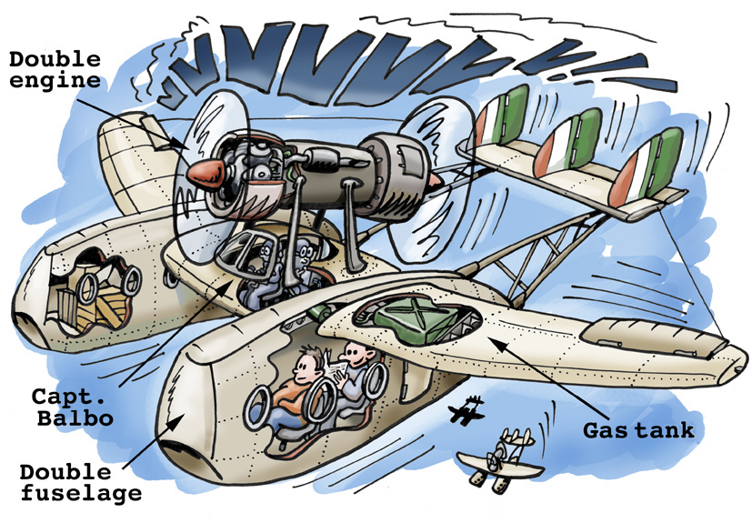 Italiaanse vliegtuig bouwer die in de jaren 20 furore maakte, kapitein Balbo vloog zelfs de Atlantische Oceaan over in een Marchetti. Door Peter Welleman